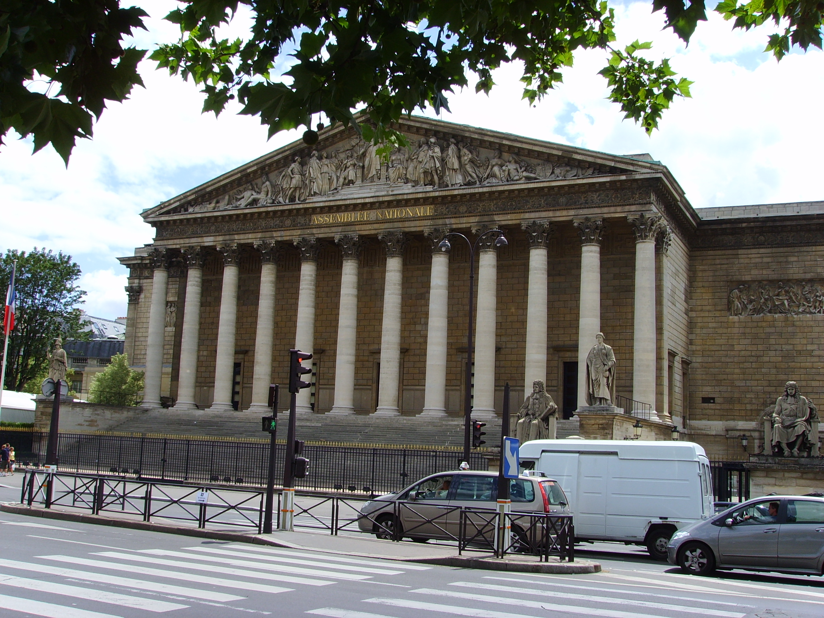 Assemblée Nationale, Paris